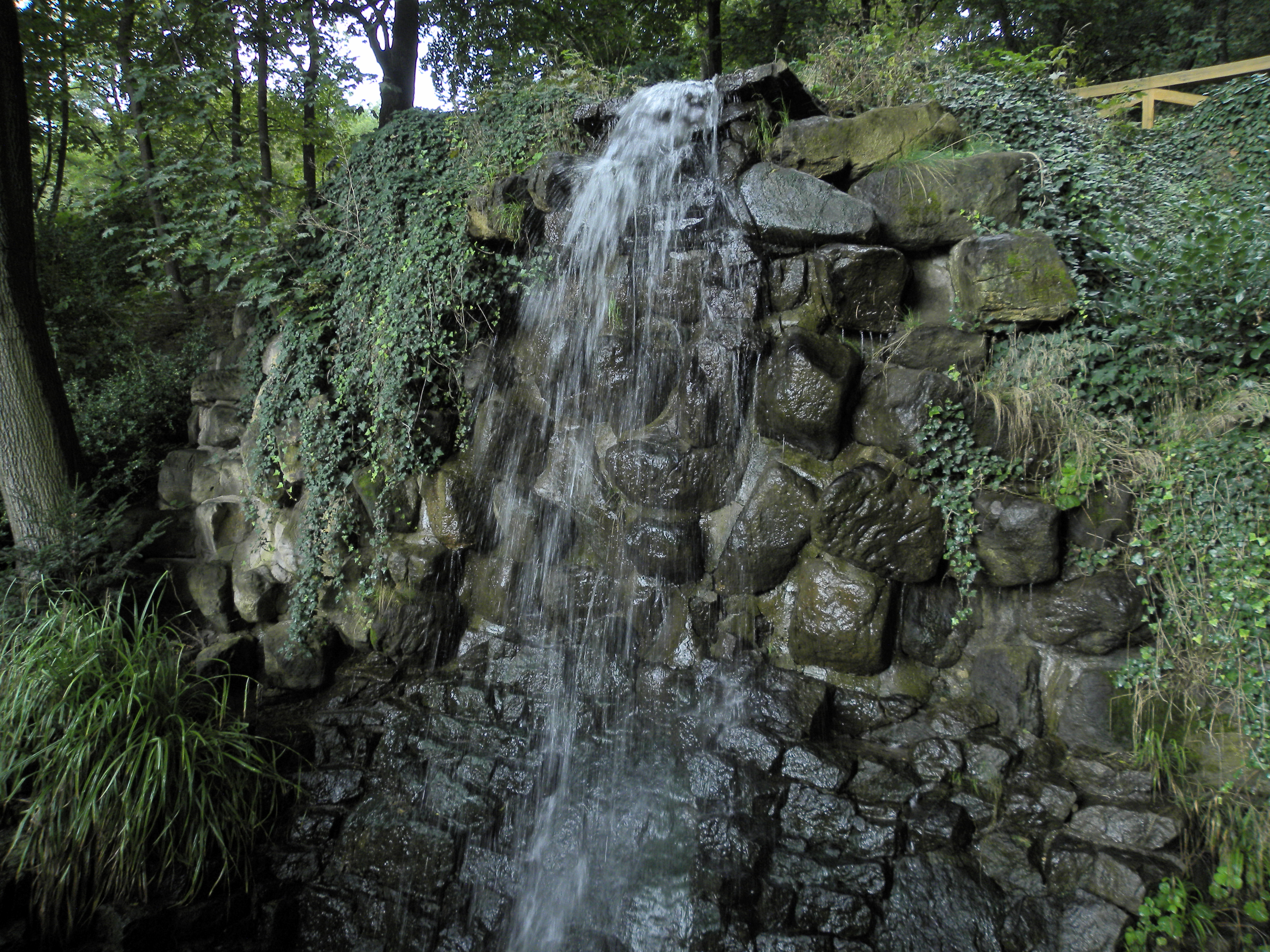 Praha Petřín